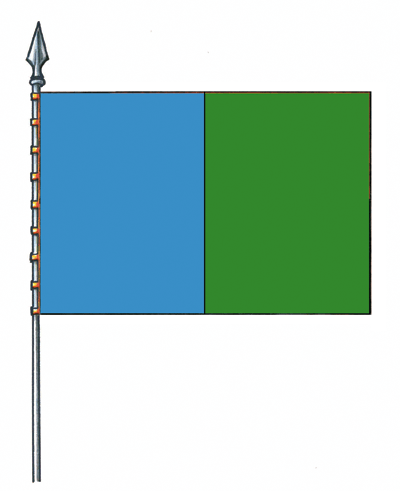 Bandiera del Comune di Campo Ligure, Liguria, Italia